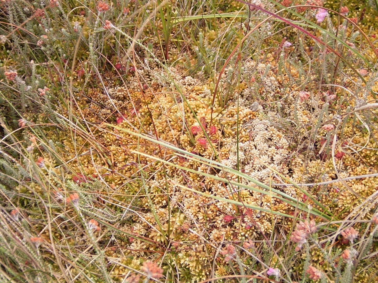 Torfmoos-Schwingdecke (Sphagnum spec.) auf verlandetem Hochmoorkolk; Brunselmeer (Emsland)